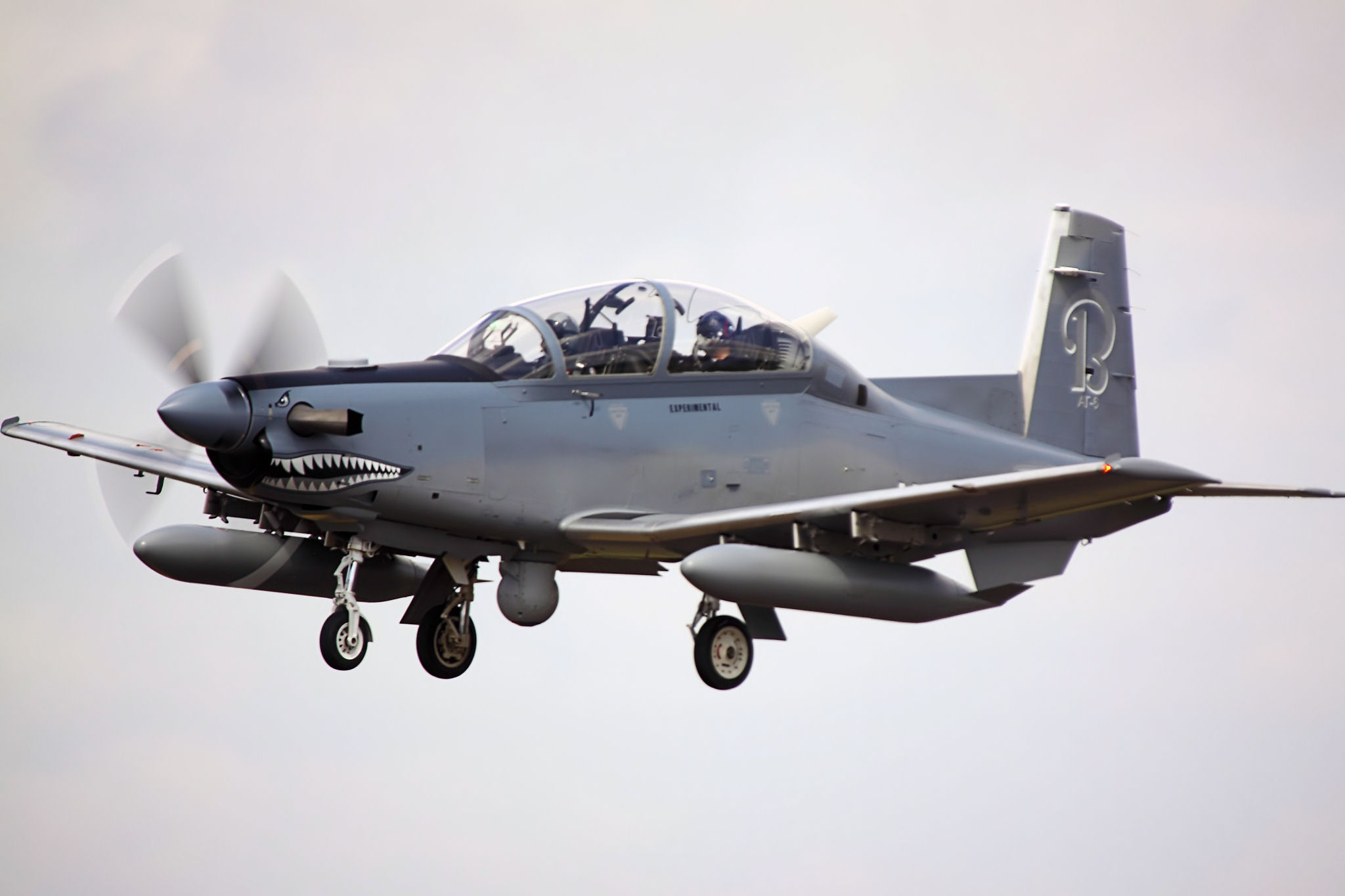 Beechcraft AT-6 - RIAT 2010